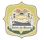 Brasão do município de Rolim de Moura, Rondônia, Brasil.